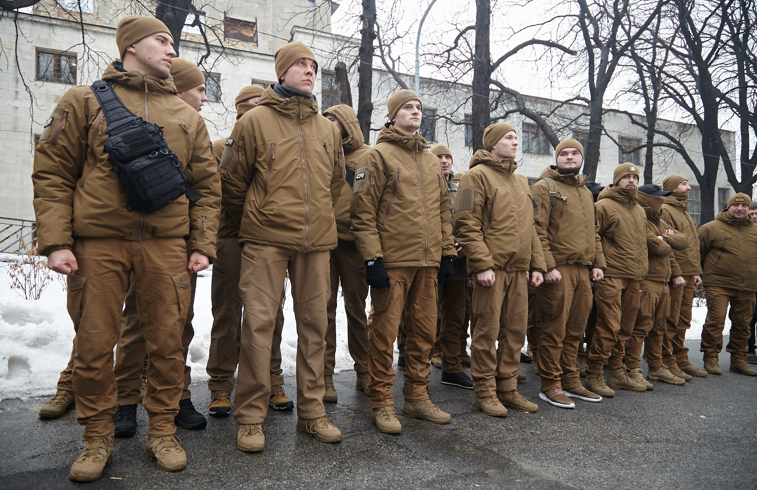 Муниципальная стража